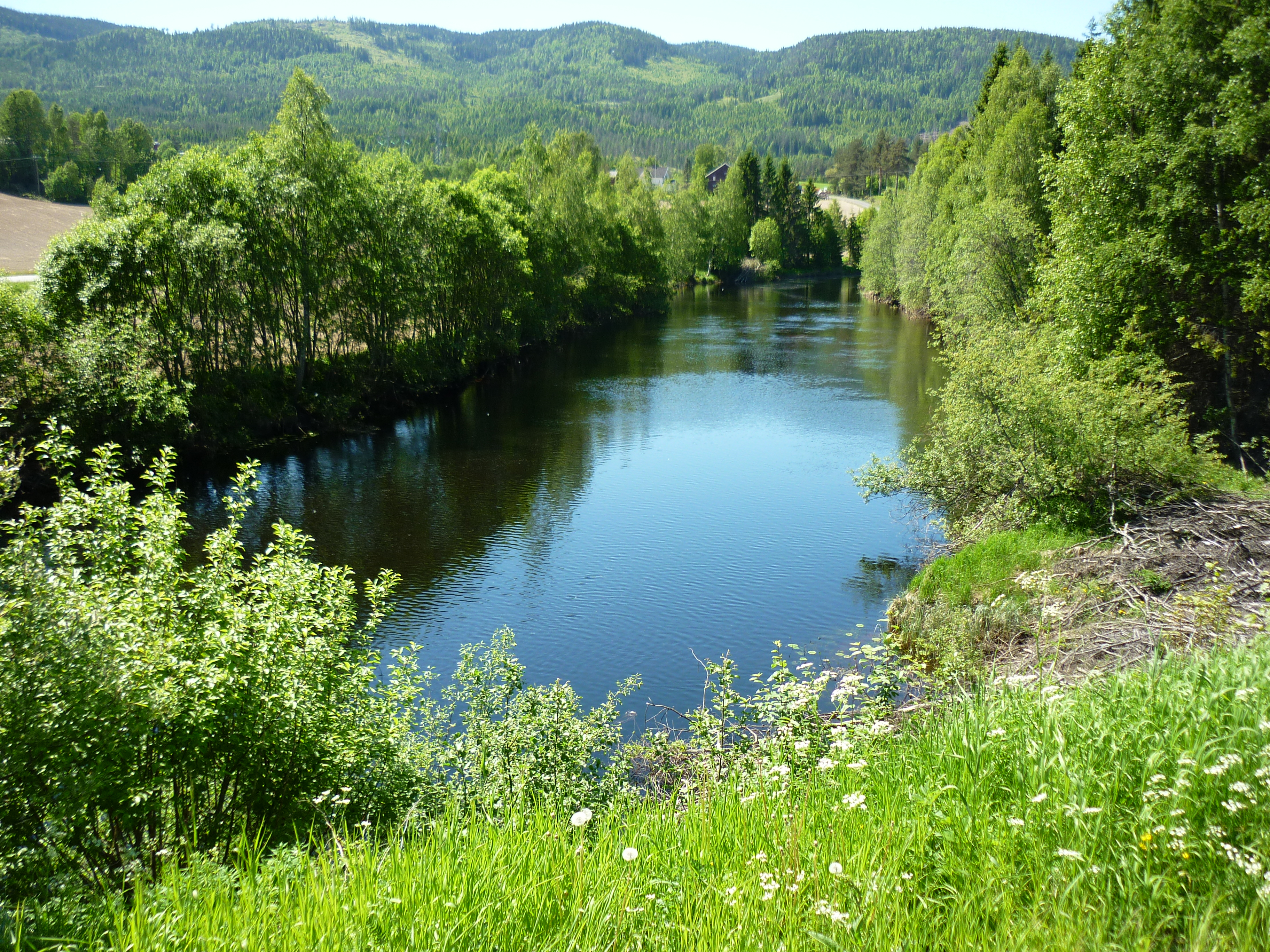 Sogna nord for Bårnås bru i Soknedalen. Holleia i bakgrunnen.